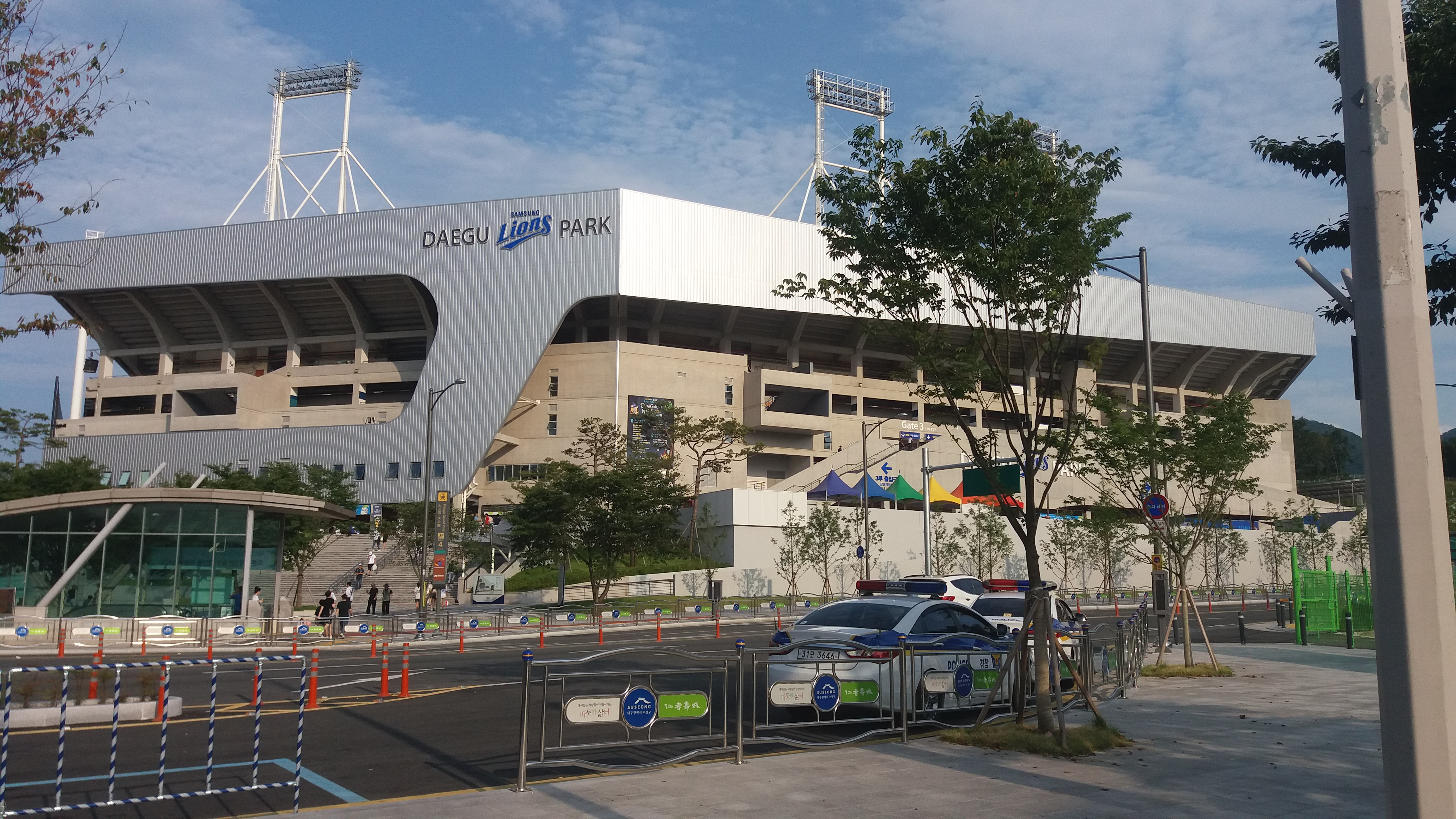 대구 삼성 라이온즈 파크 외부전경